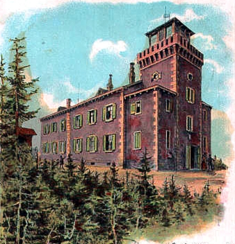 Altes Fichtelberghaus